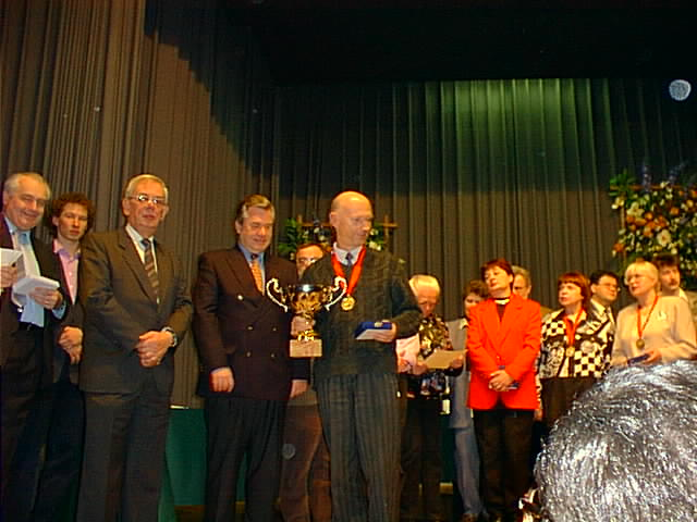 Siegerehrung zur Schachweltmeisterschaft der Senioren 1997 in Bad Wildbad. Dritter von links ist Egon Ditt, Präsident des Deutschen Schachbundes. In der Mitte steht Janis Klovans, der Seniorenweltmeister 1997. Vierte von rechts ist Tatiana Zatulovksaya, die neue Weltmeisterin.